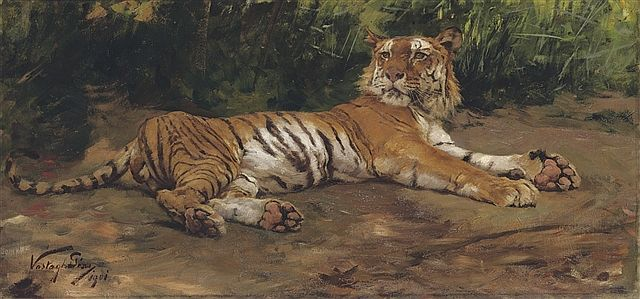 Királytigris. Vastagh Géza (1866-1919) festménye.